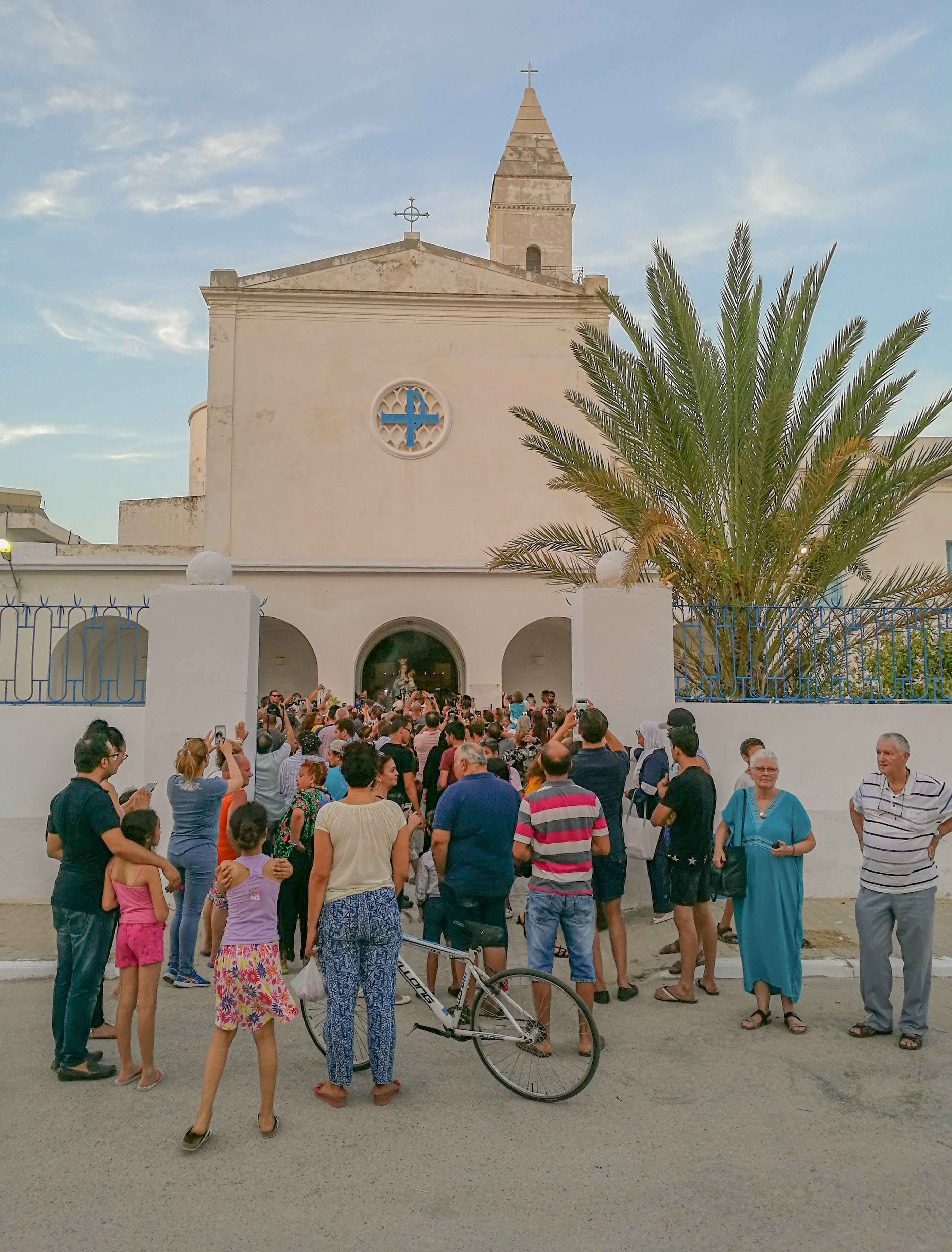 Premiere Assomption du 15 Août de la vierge de Trapani à la Goulette depuis 1960